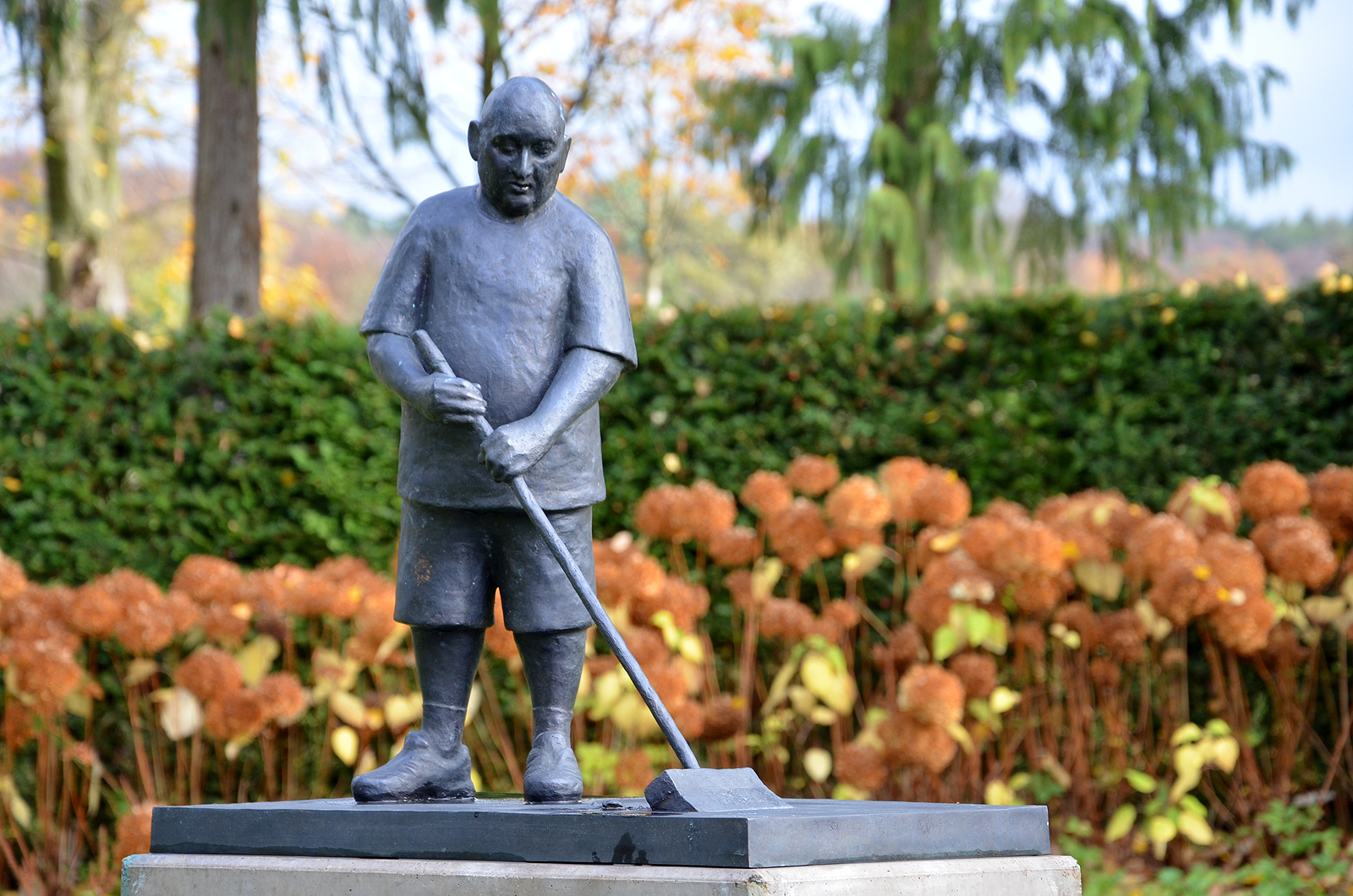 Urs Lüthi: Skulptur Selbstporträt, 2010 (60 cm hohes Monument Besenmannlein, in der Parkanlage des Kulturdenkmals Hermannshof in Völksen)